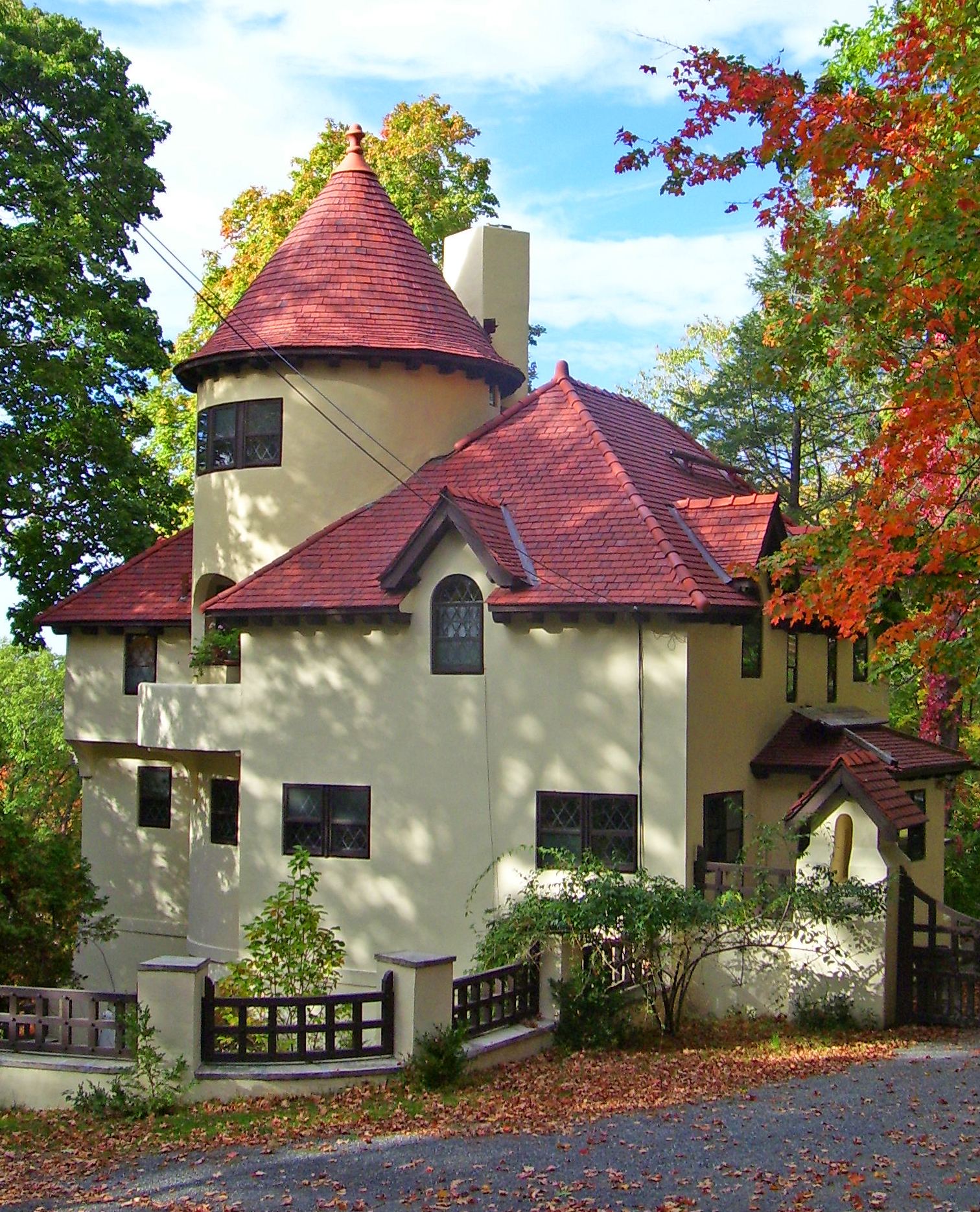 Gatehouse on Deerhill Road